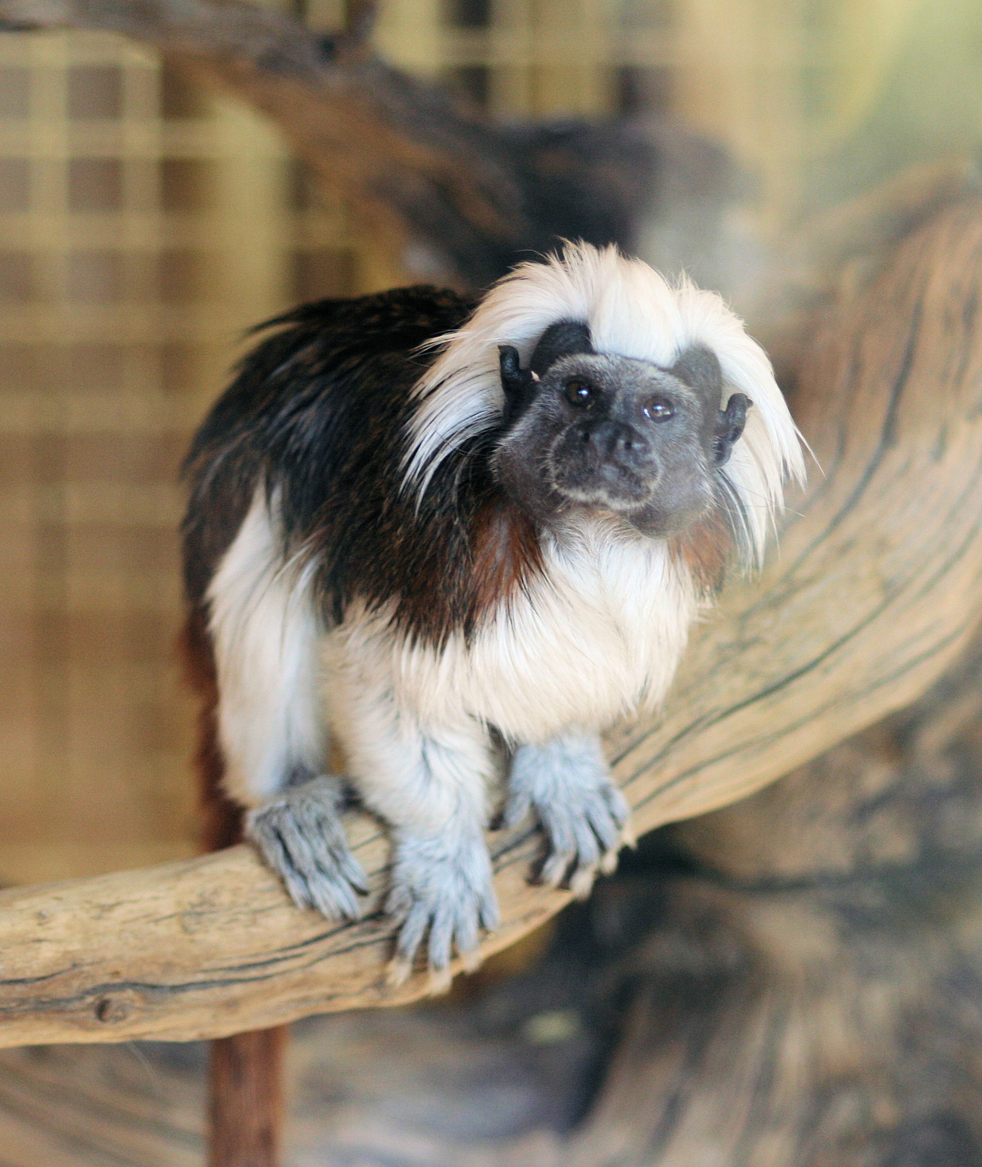 Lisztaffe im Karlsruher Zoo